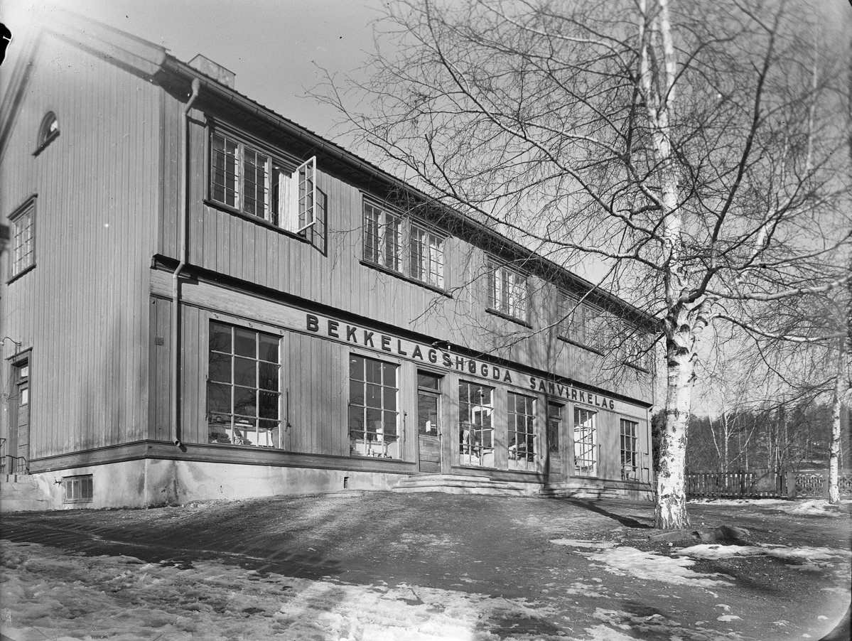 Oslo samvirkelag avd. 61 i Sandstuveien 12.